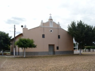 Capela de Santo Antônio de Pádua. Fundada em 1742 em Araquém (Município de Coreaú, Ceará, Brasil).